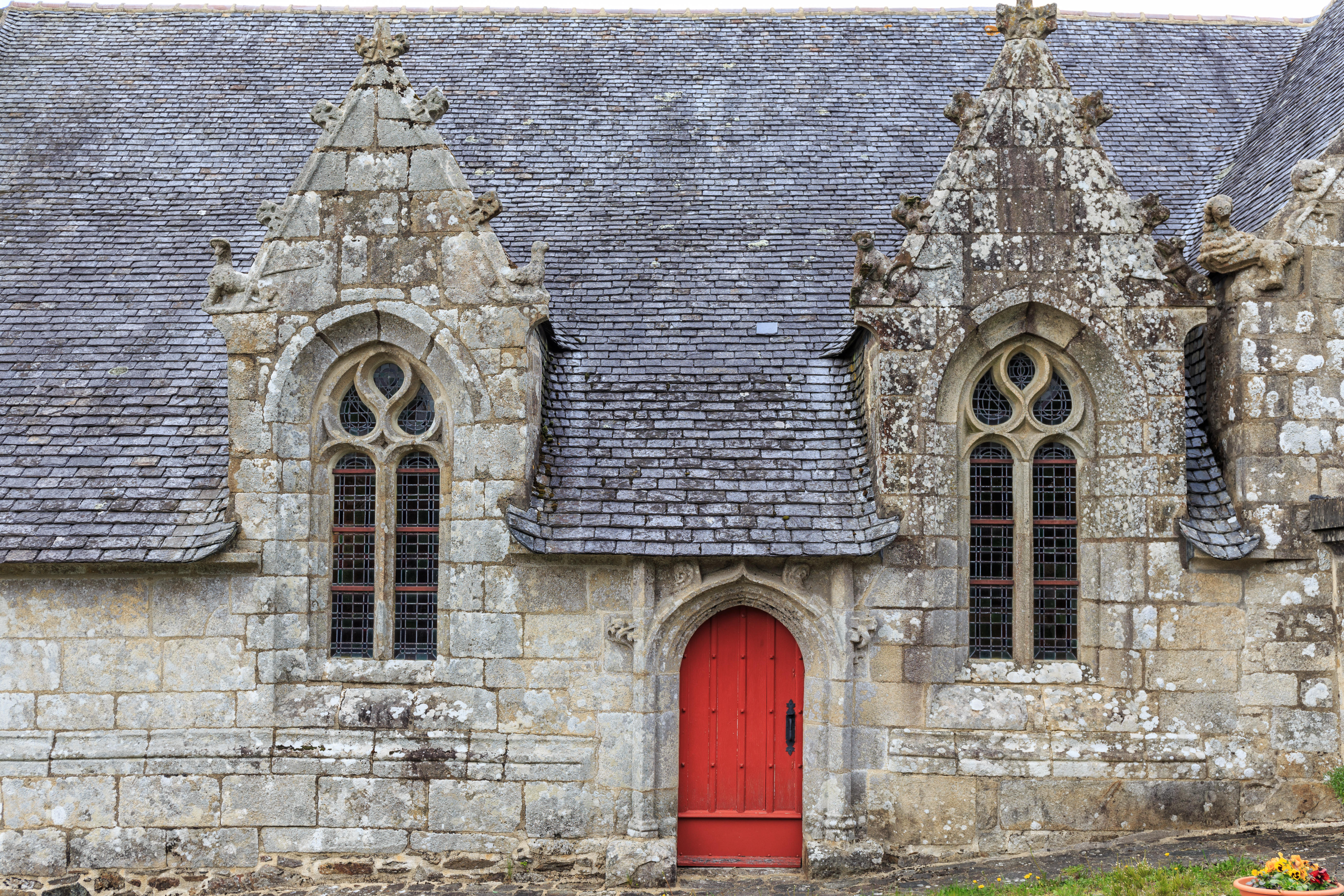 L'église Saint-Envel à Loc Envel, Côtes d'Armor.